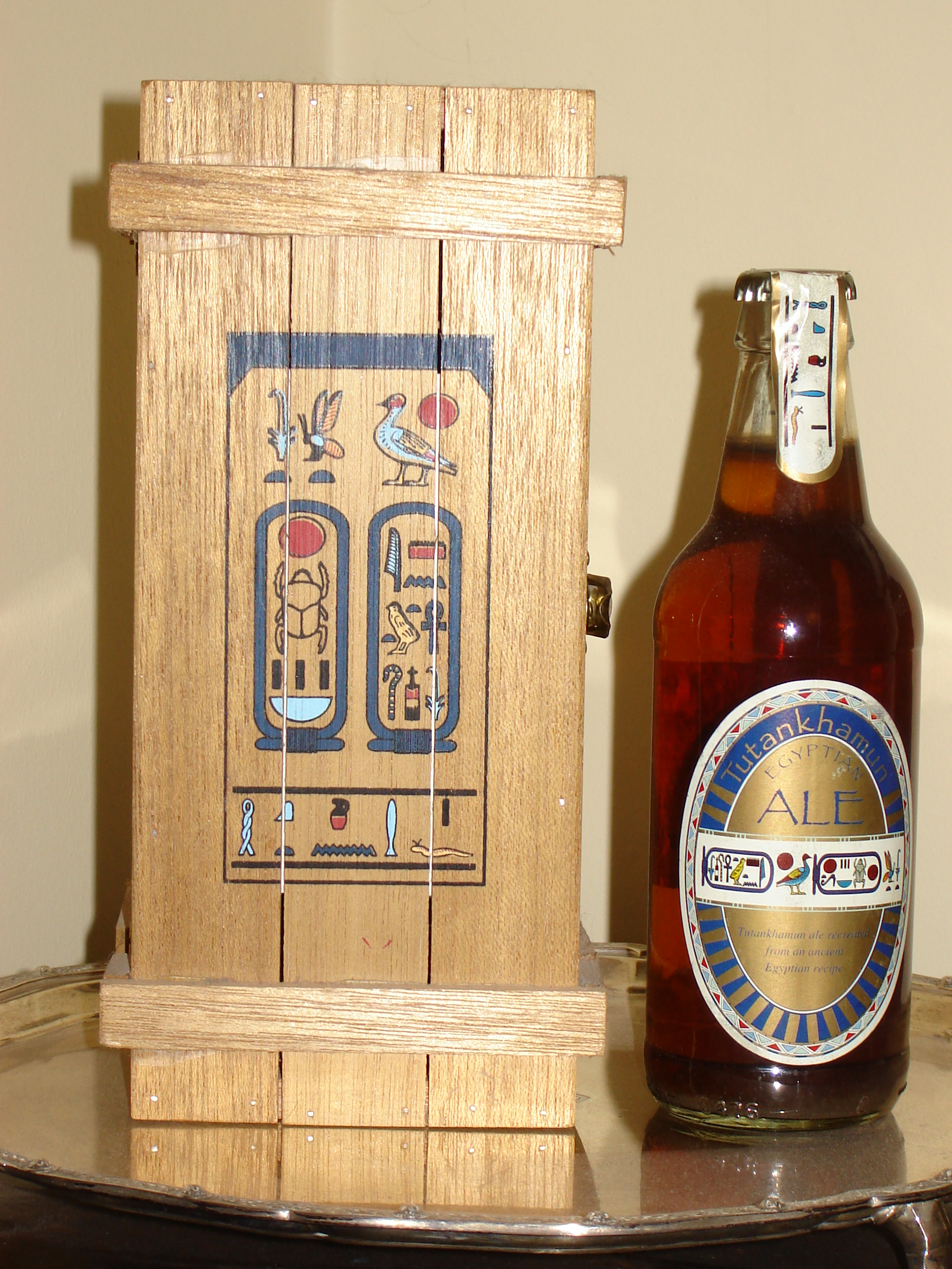 Tutankhamun Ale. Foto di Mark Nesbitt